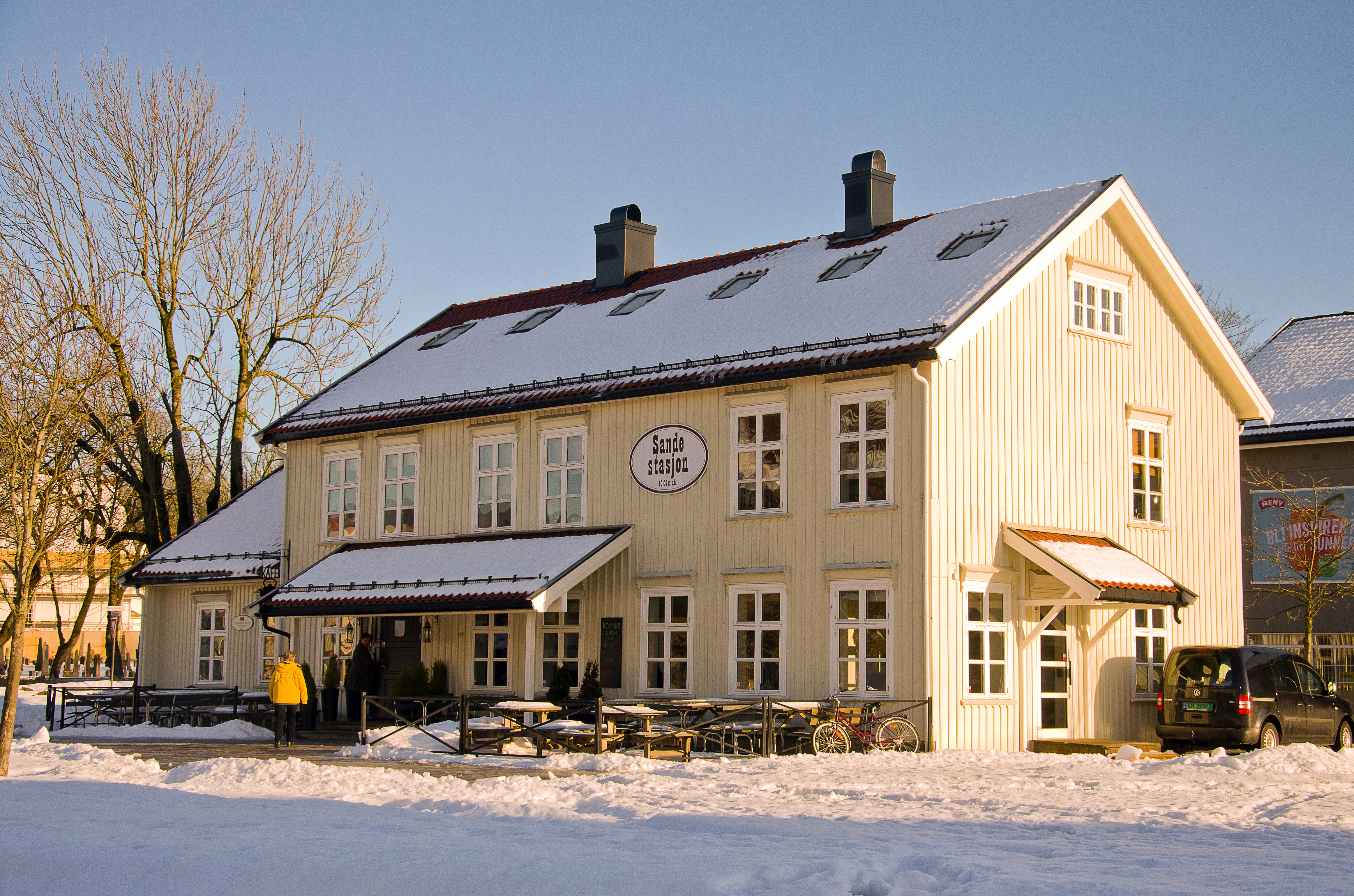 Gamle Sande stasjon, som tilhørte Vestfoldbanen